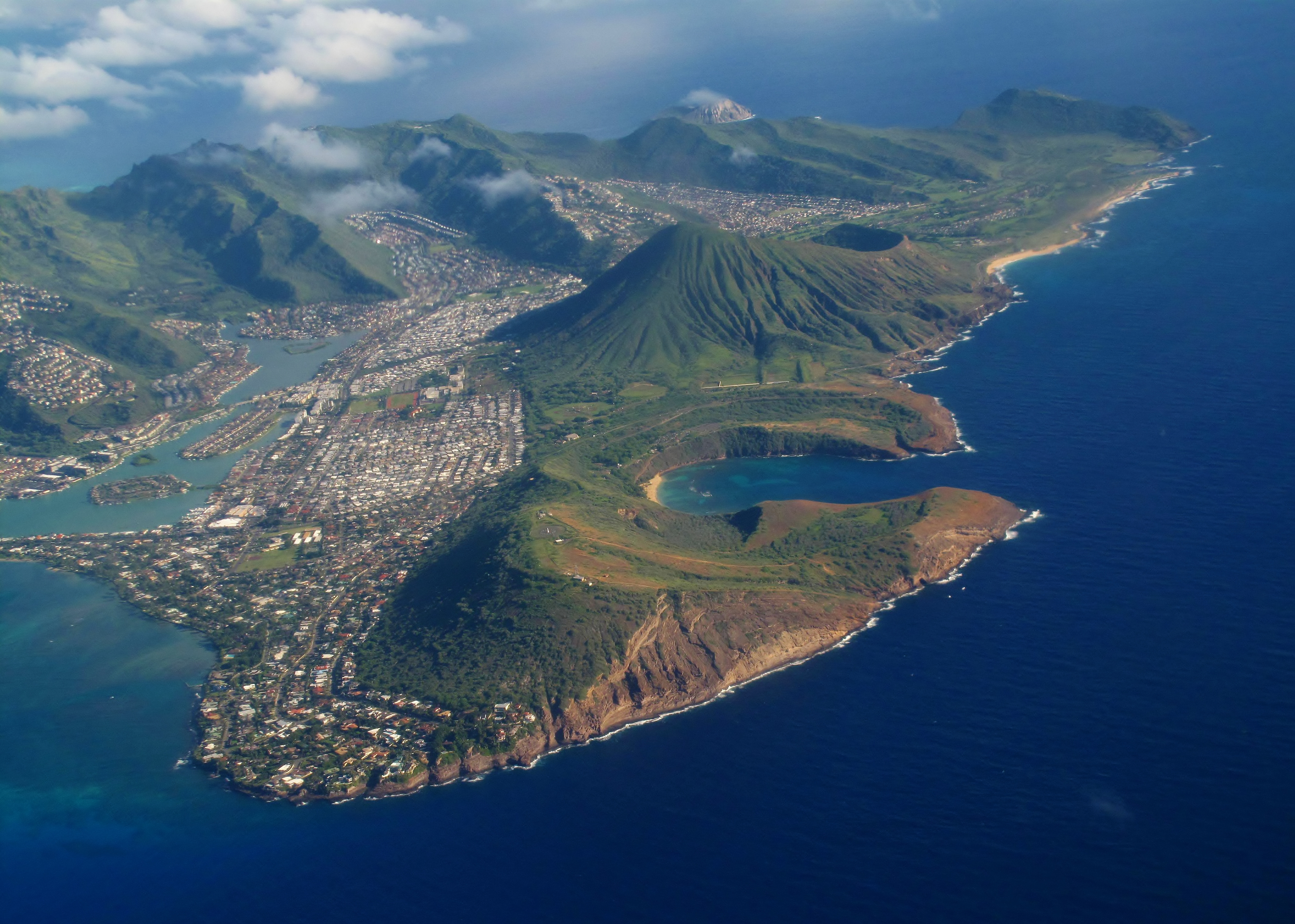 East Oahu